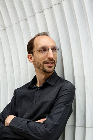 Crédit photo : Émilie Hautier 2018